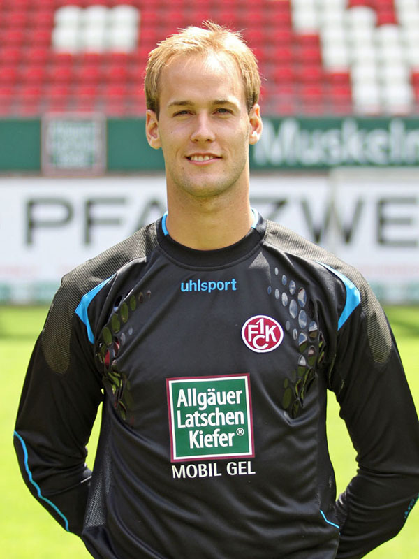 Marco Knaller, Fußballtorhüter